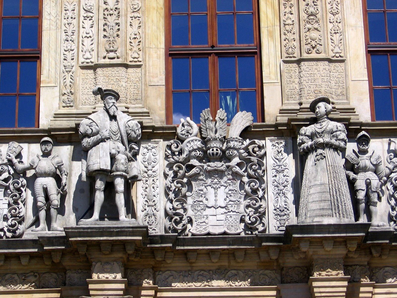 Brzeg - zamek